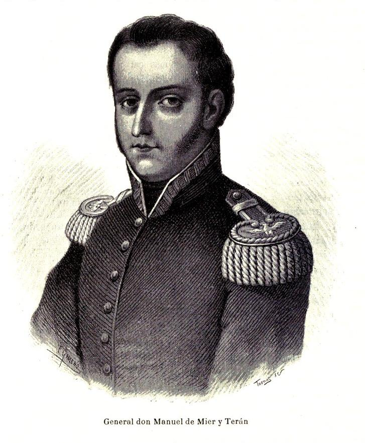 Imagen extraida del libro de Vicente Riva Palacio, Julio Zárate (1880) "México a través de los siglos" Tomo III: "La guerra de independencia" (1808 - 1821)